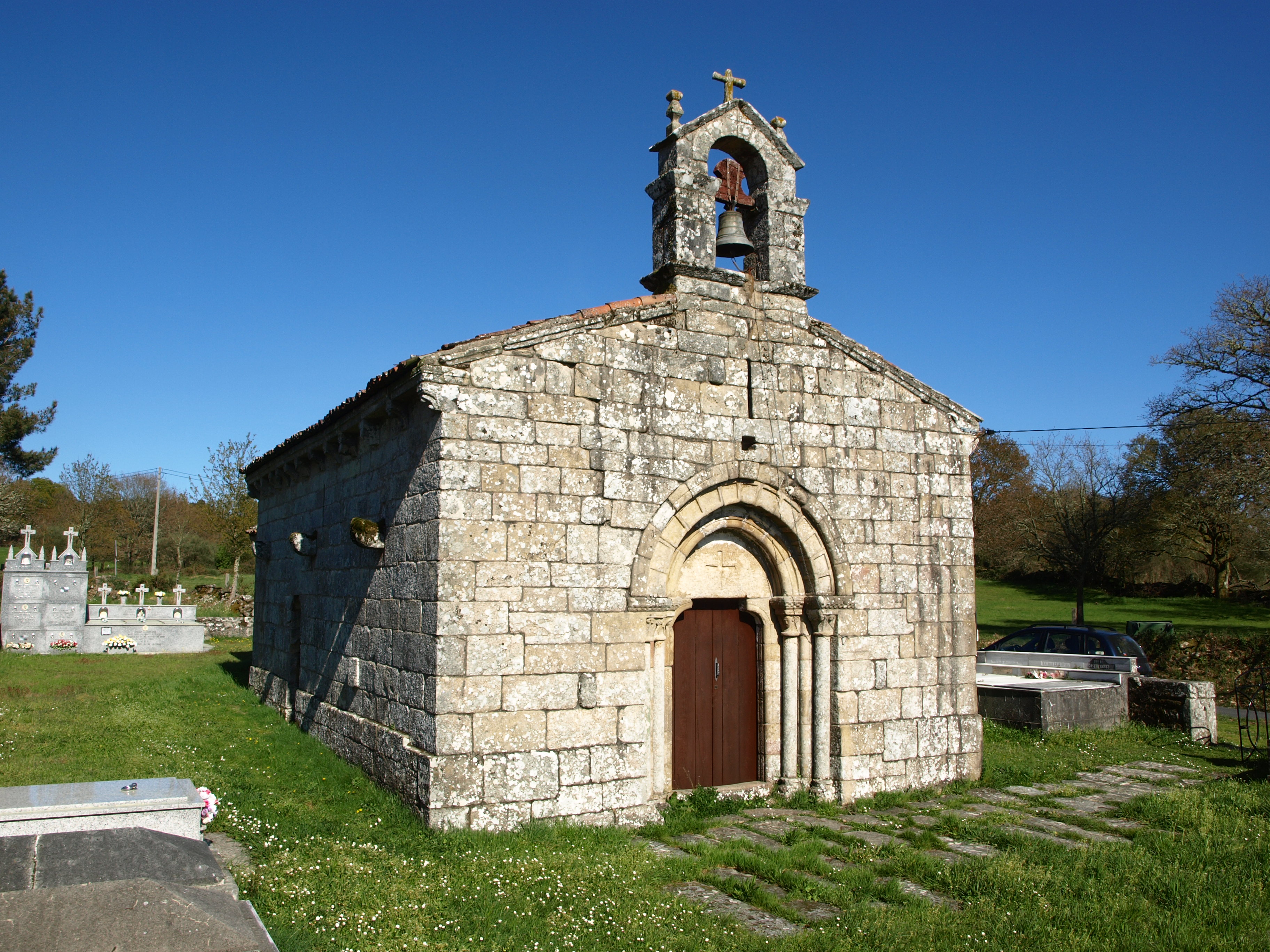 Igrexa parroquial de Bidouredo (Monterroso)